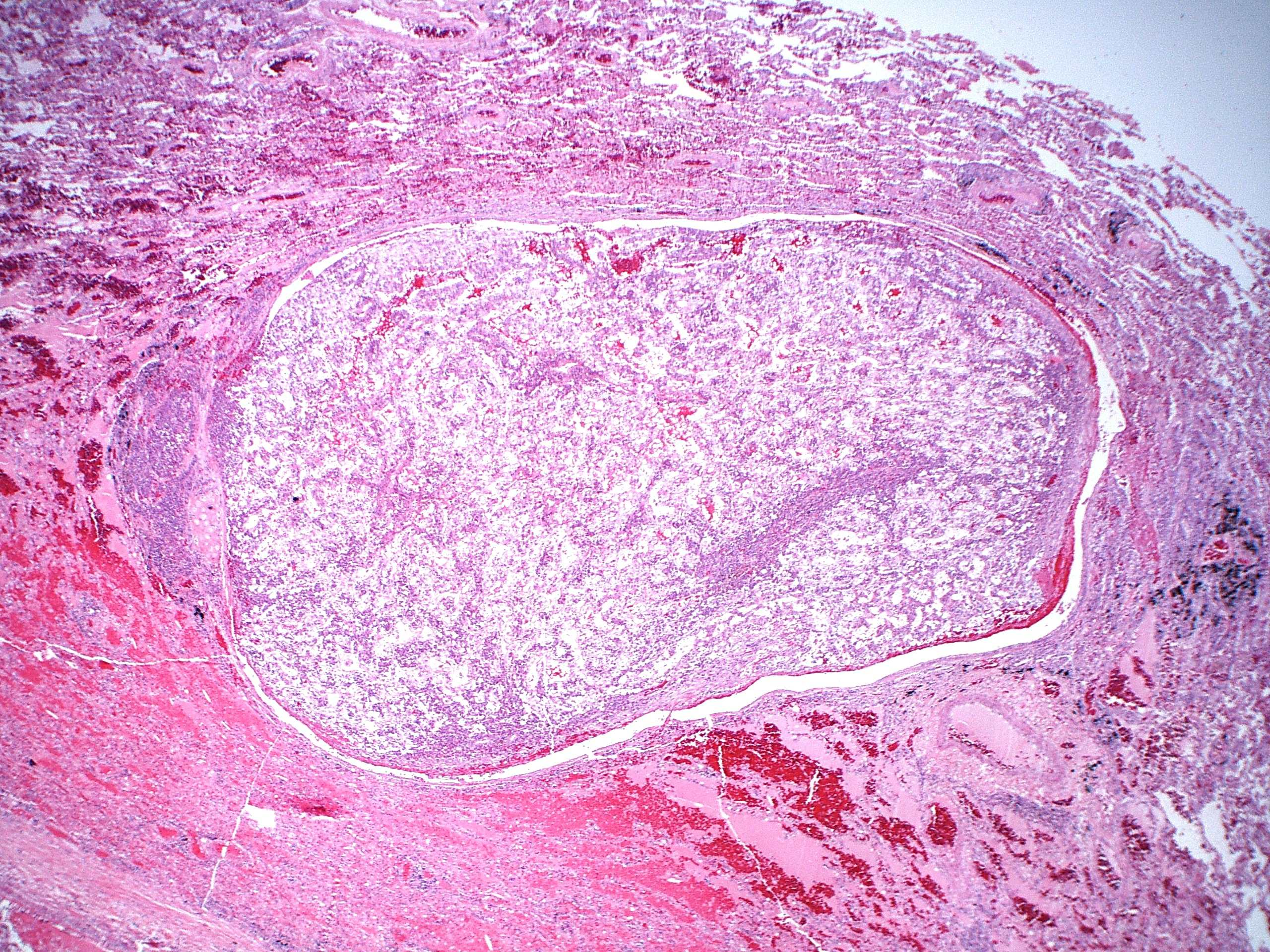 Metastatic renal cell carcinoma, intrabronchial